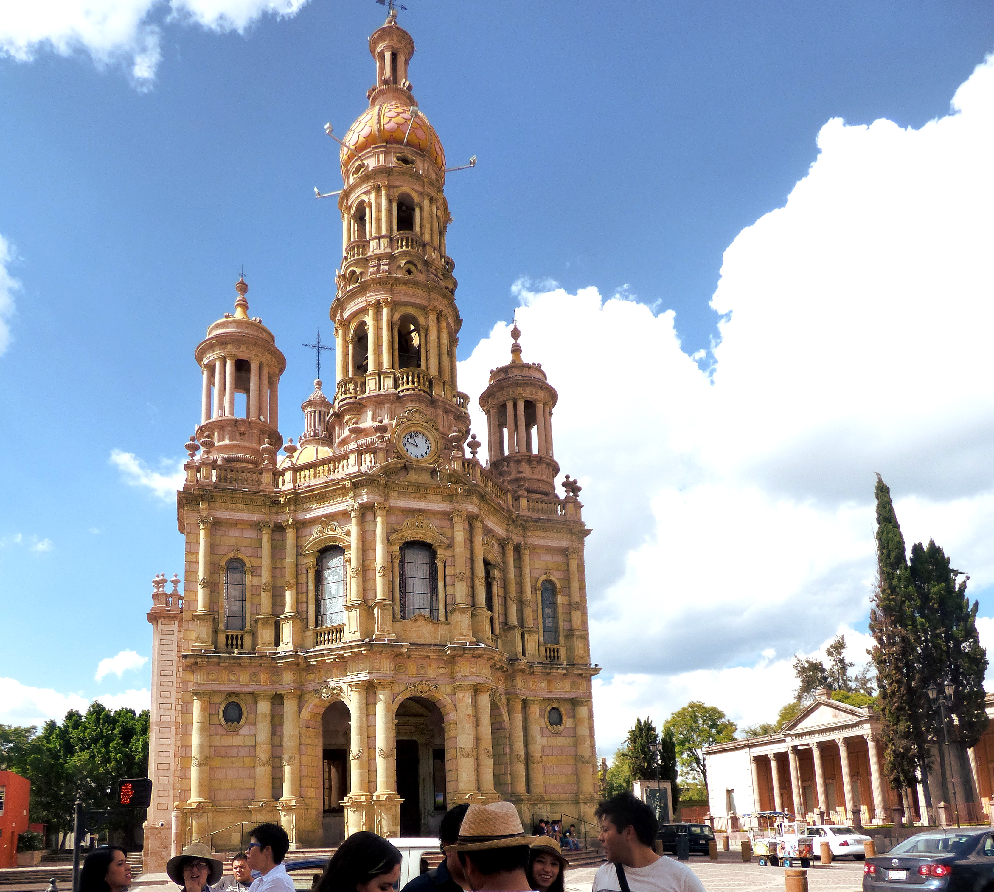 Recorrido en el centro histórico de Aguascalientes, con Fotocaminantes y The Inventor's House, para concursar en Wiki Loves Monuments 2015